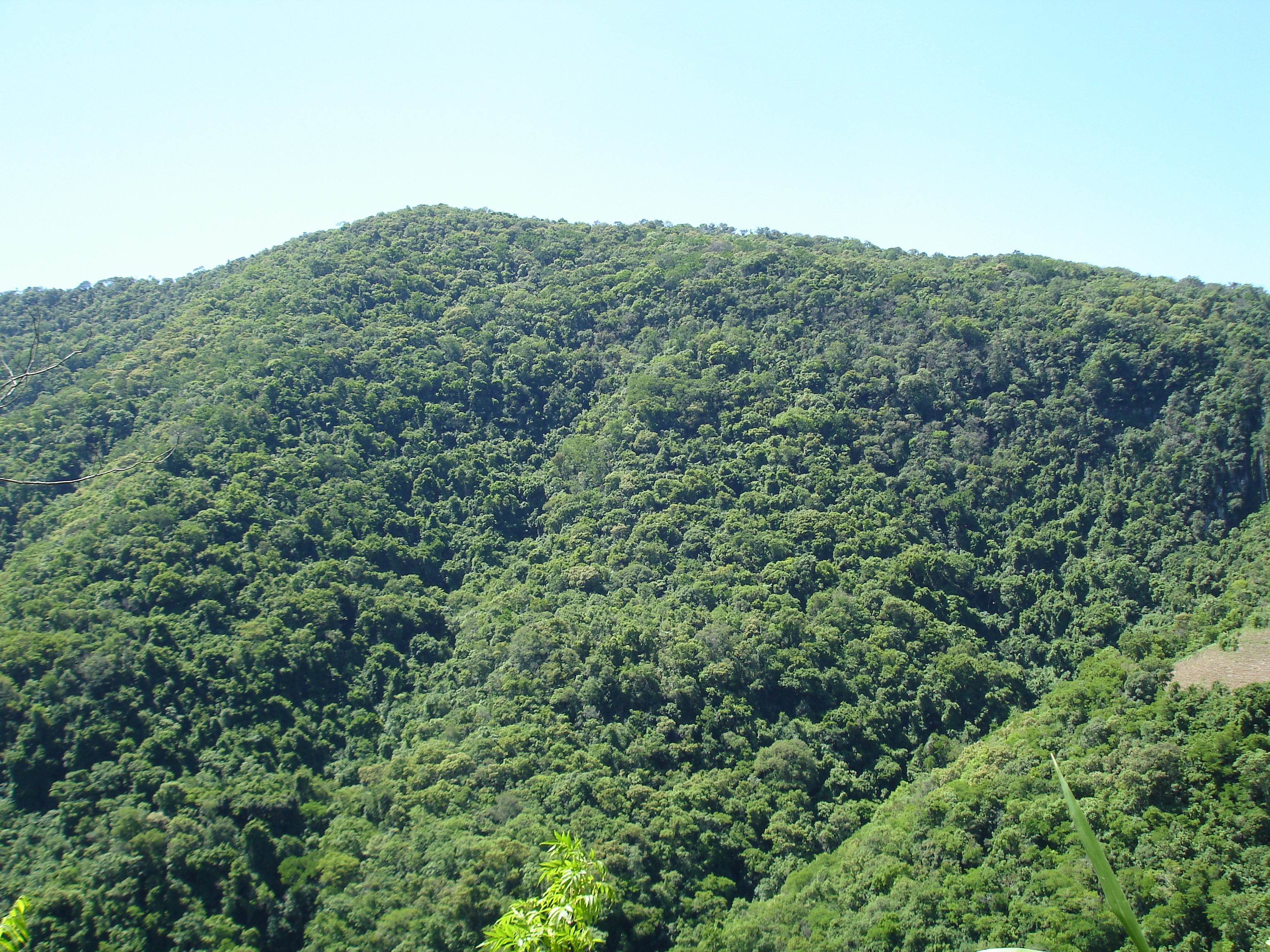 Remanescente florestal em encosta de morro em bom estado de conservação.